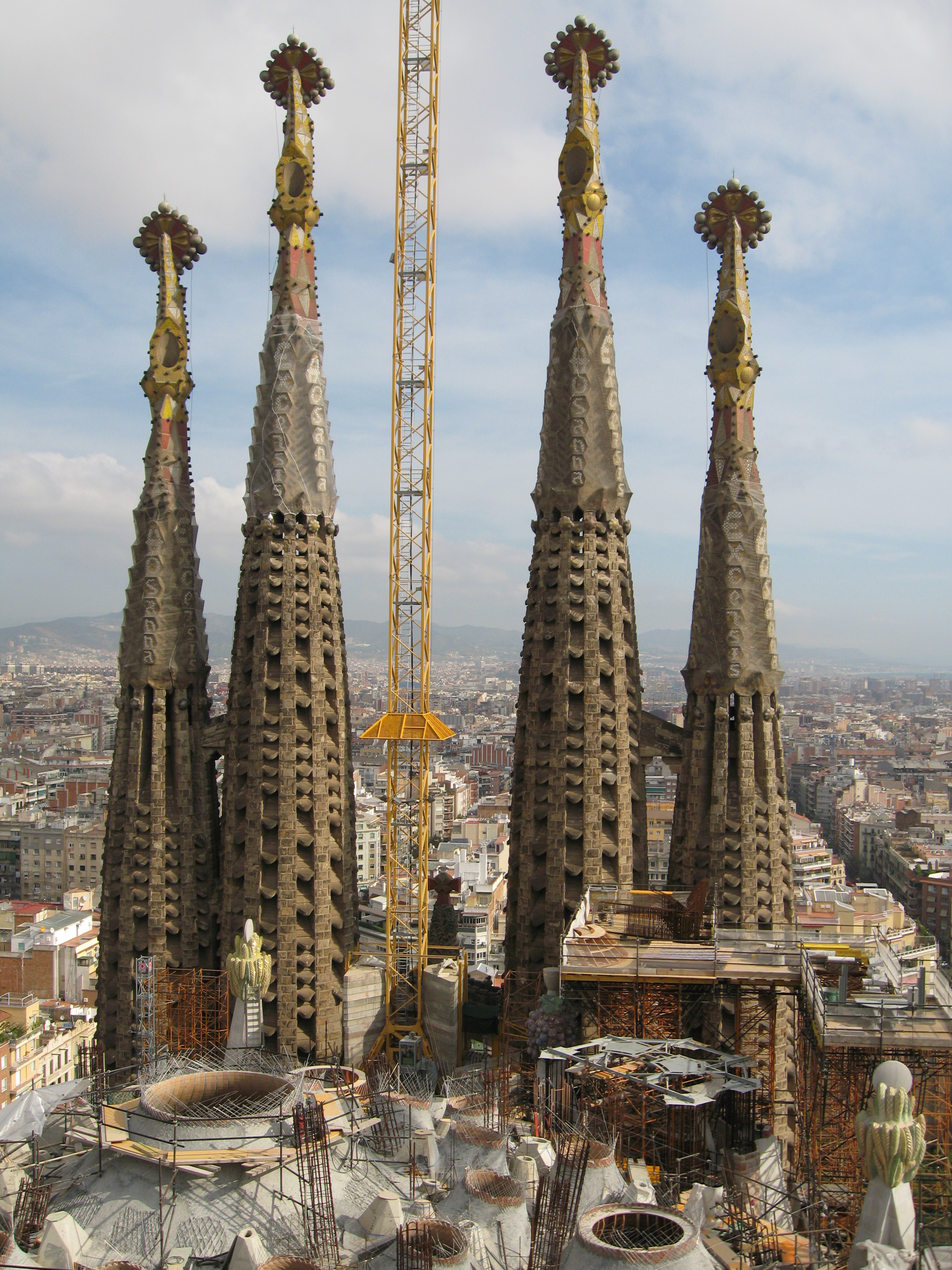 Immagine del cantiere della Sagrada Familia (2008)